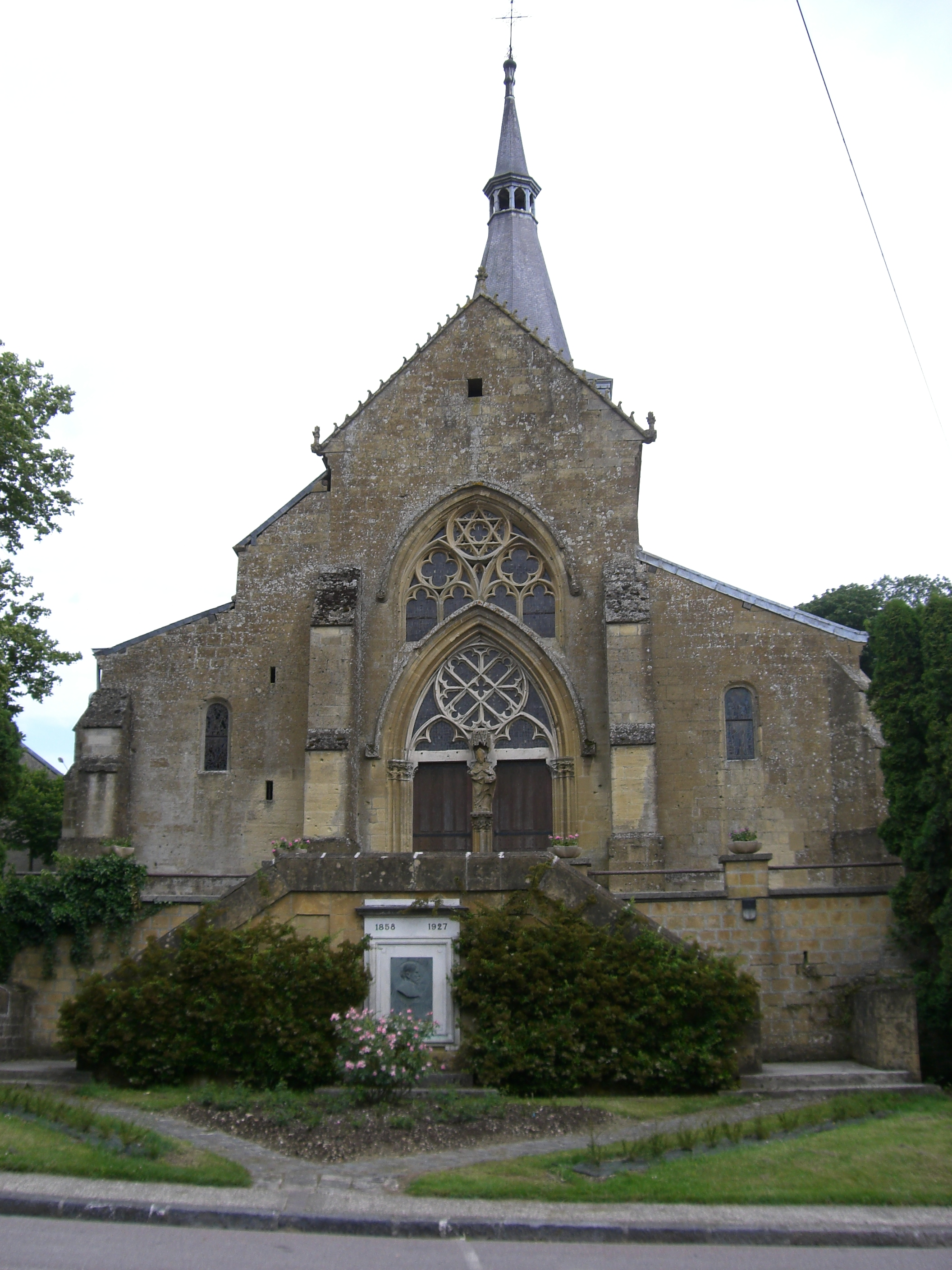 Eglise de Buzancy (Ardennes, France)